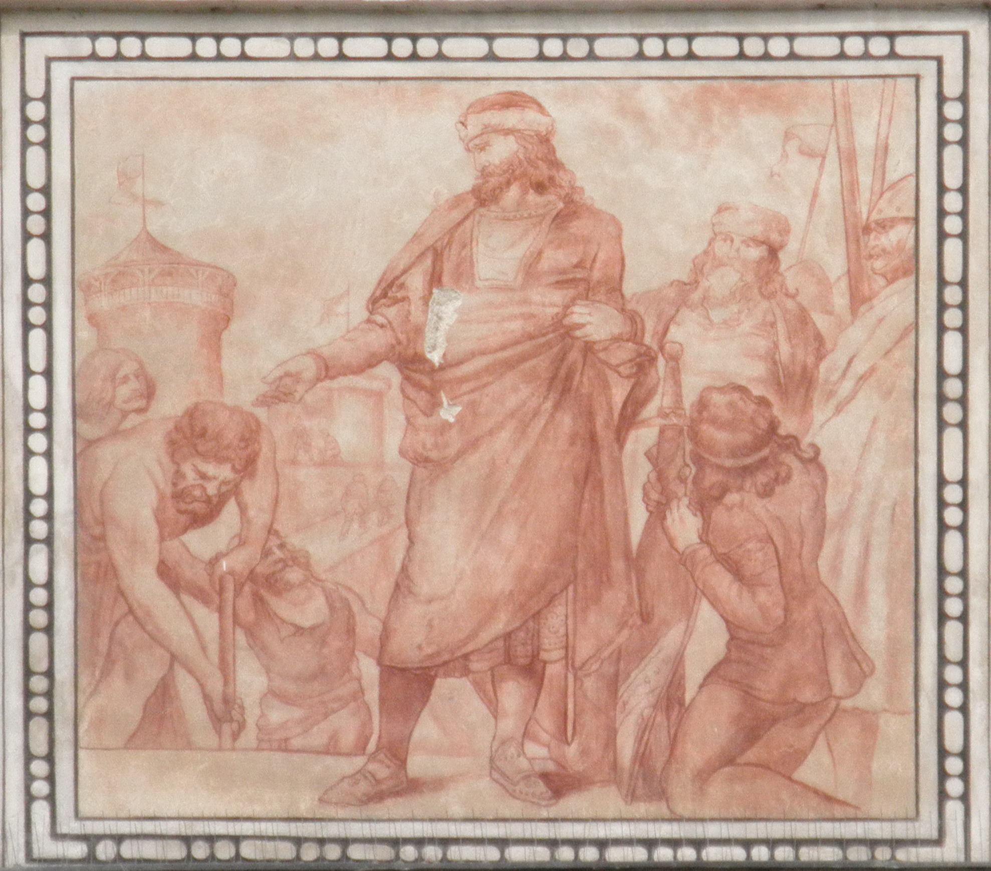 Radnice (Kolín), Karlovo nám. 77, Kolín. Freska: "Přemysl Otakar II. dohlíží na stavbu hradeb", autor: Adolf Liebscher.